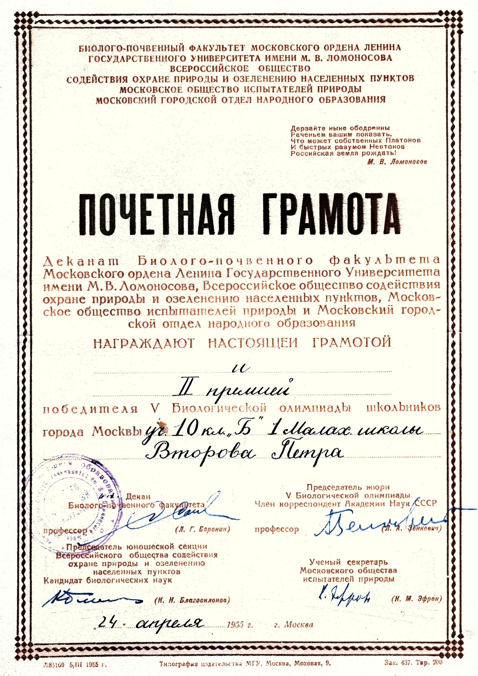 Грамота П. П. Второва, Победитель 5 московской олимпиады по биологии. Подписи: Воронин, Леонид Григорьевич, Благосклонов, Константин Николаевич